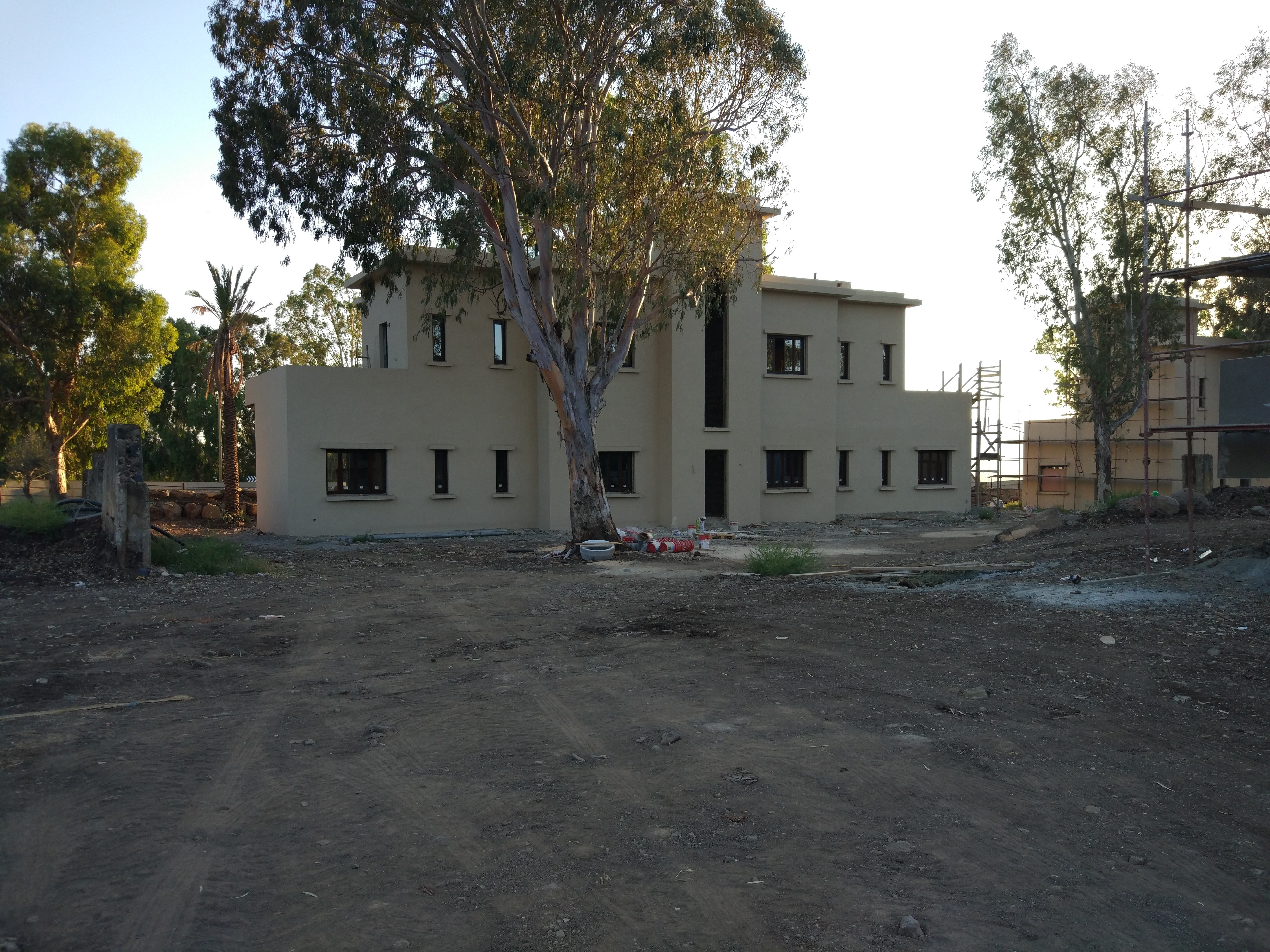 המבנה הראשי (הסמוך לכביש) בבית המכס העליון, בתהליך שיפוצו, יולי 2017